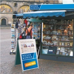 Weser-Kurier Aufsteller